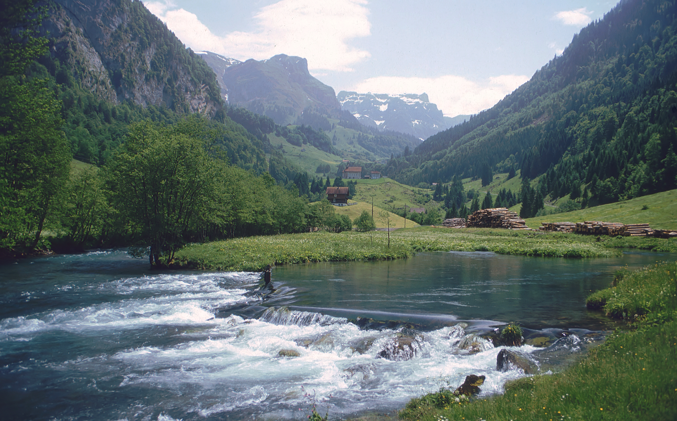 Bisistal mit Muota und weiter hinten der Ortsteil Dürenboden des Hauptortes Bisisthal; Kanton Schwyz/Zentralschweiz